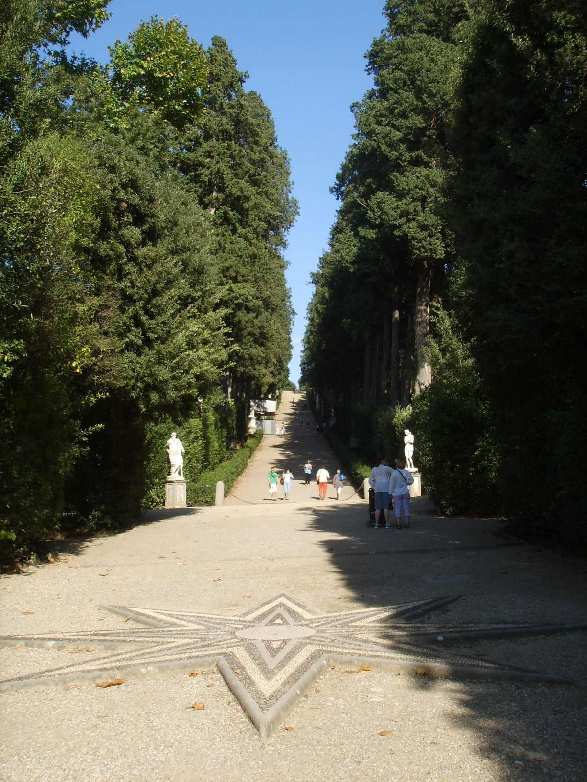 Boboli, il viottolone